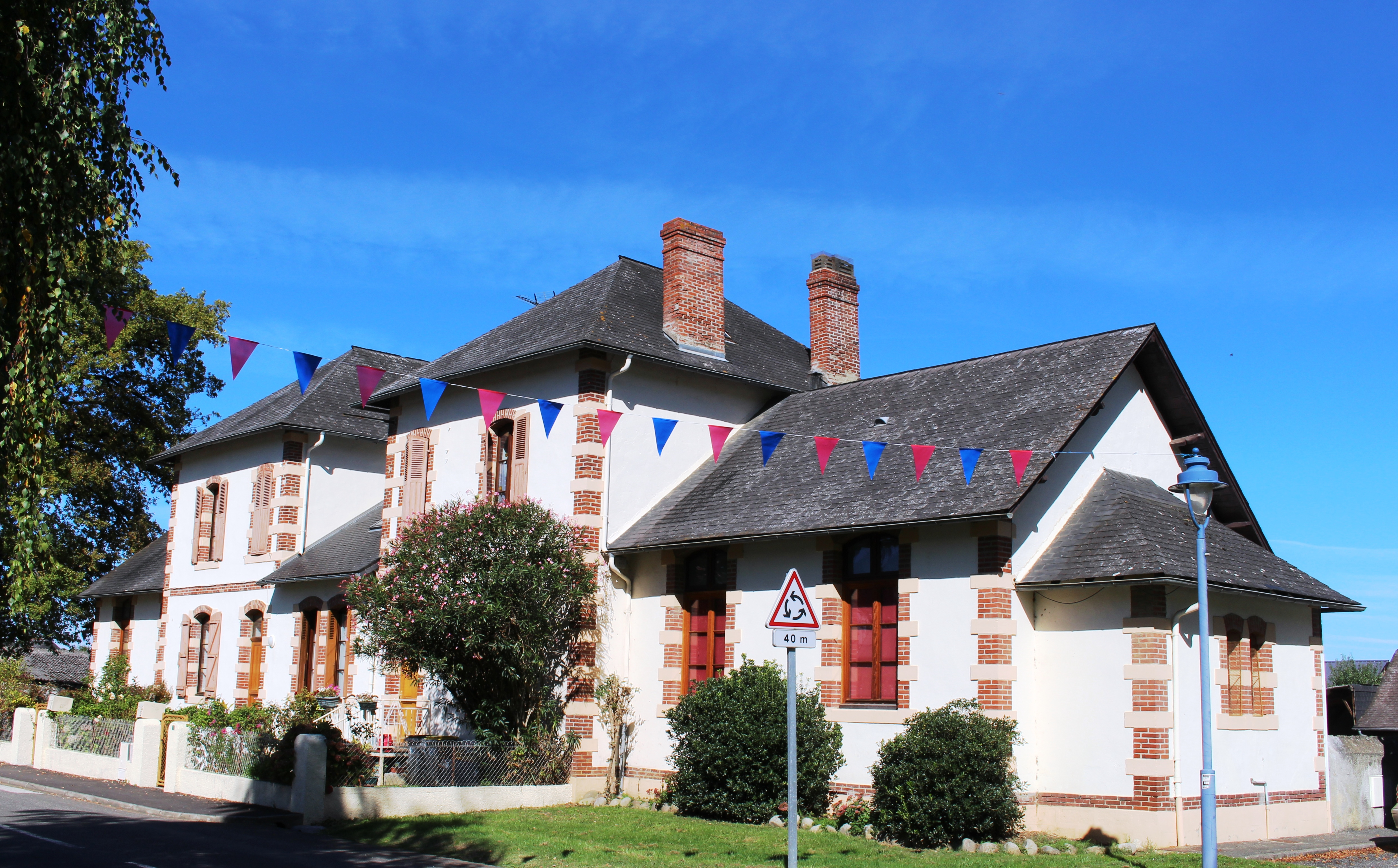 École de Vielle-Adour (Hautes-Pyrénées)